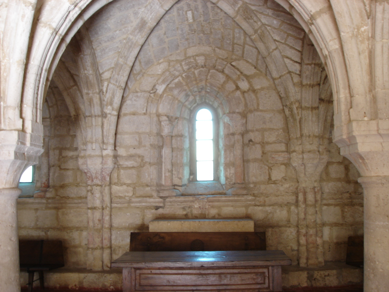 Interior cisterciense del Monasterio de la Santa Espina (Valladolid, España)